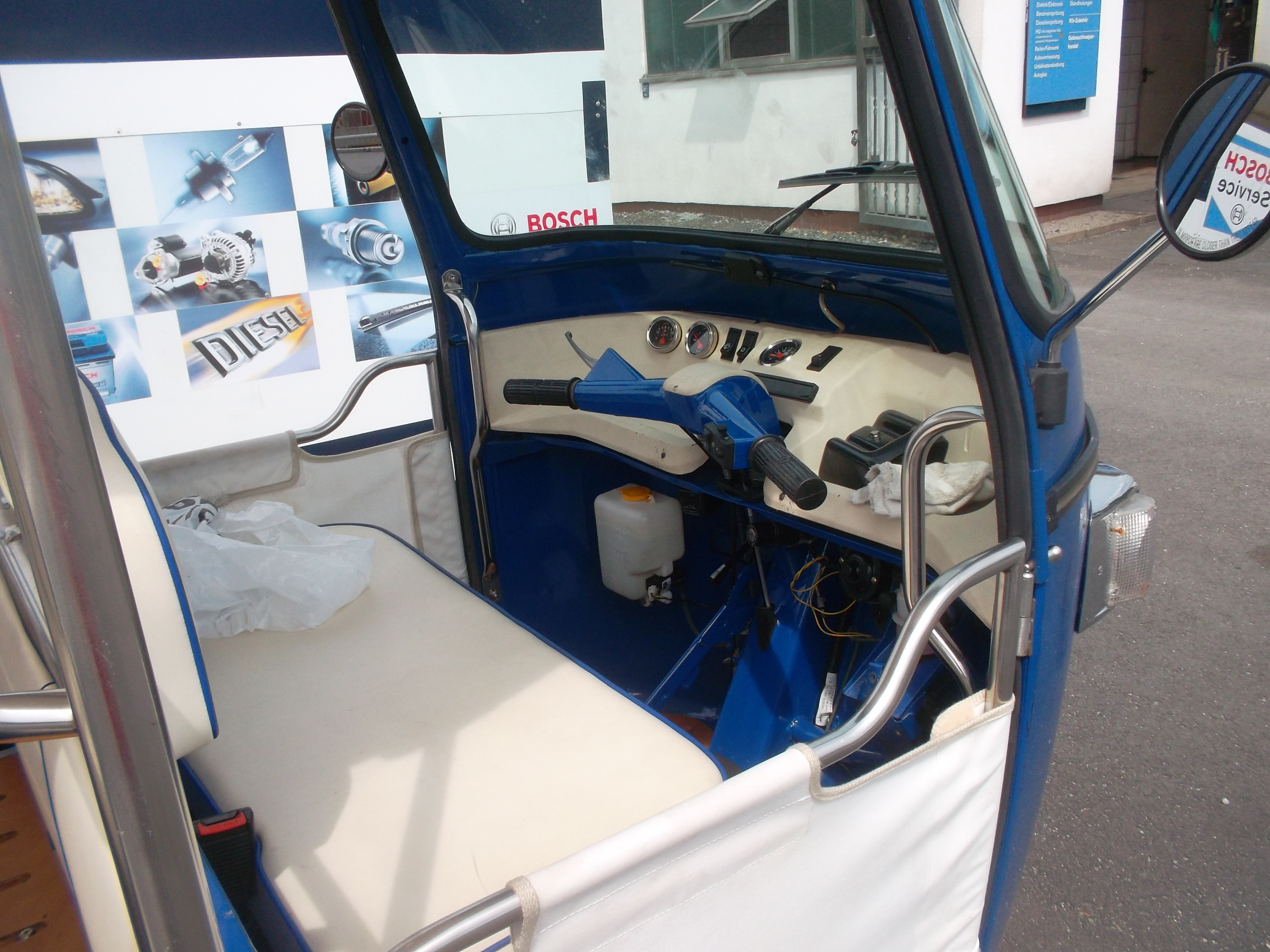 Ansicht der Fahrerkanzel einer blauen Ape Calessino